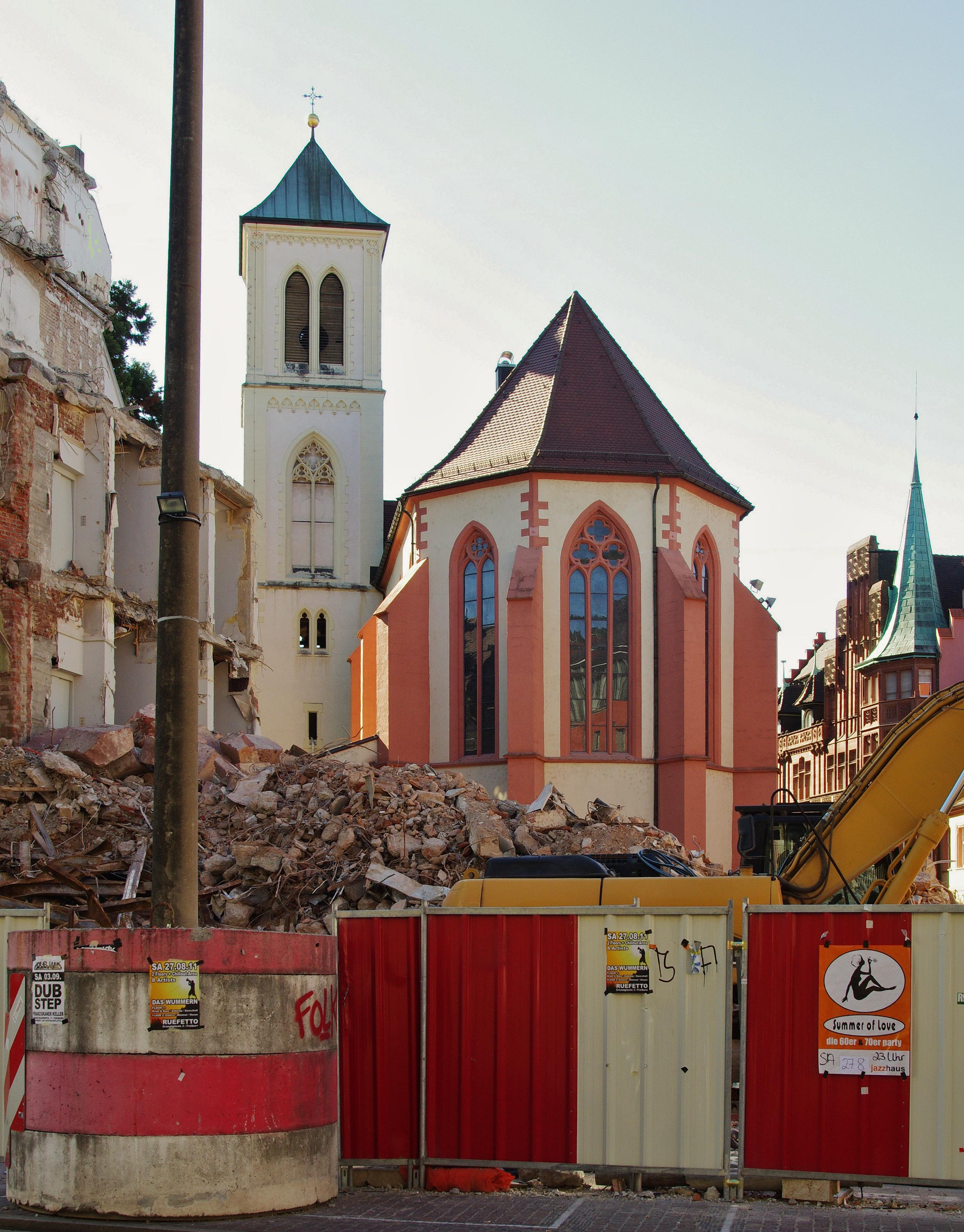 Der Chor von St. Martin in der Freiburger Altstadt war so vorübergehend von der Kaiser-Joseph-Straße sichtbar, nachdem das Haus Nr. 192 abgerissen war